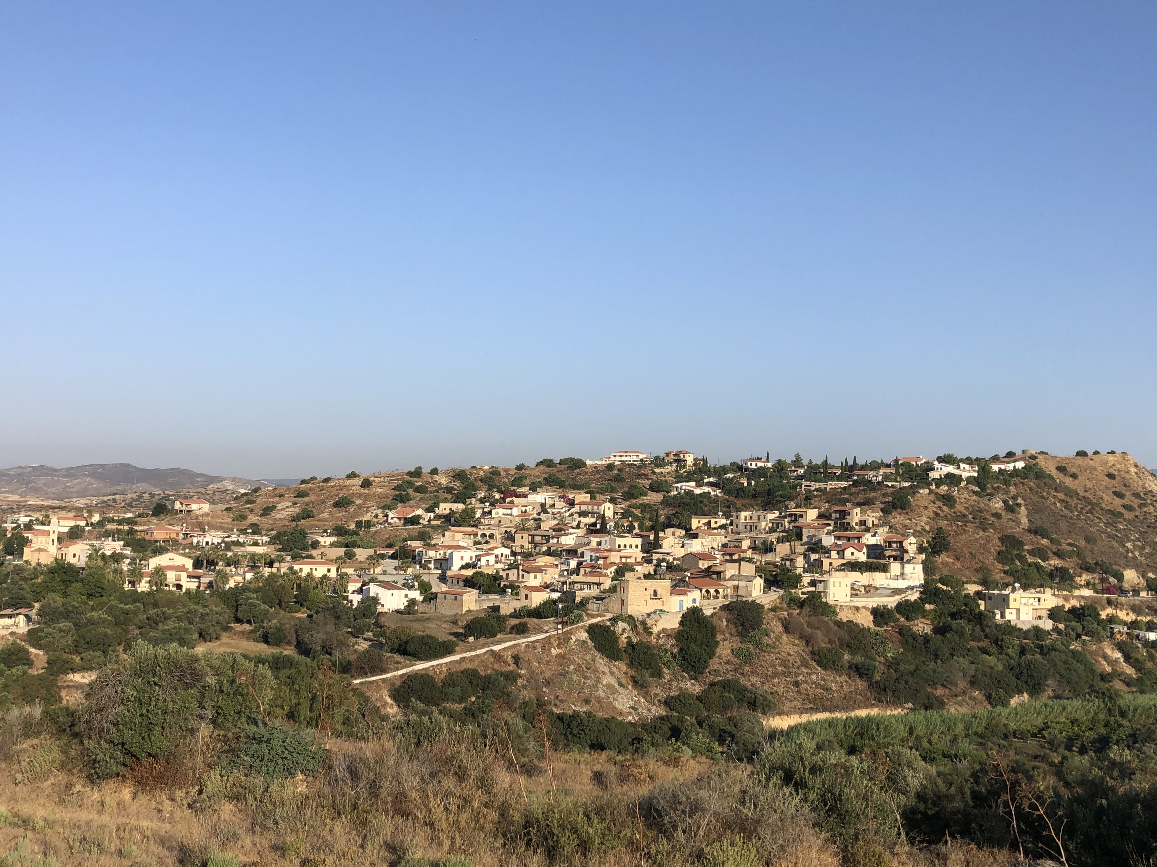 Blick von der Kapelle auf Psematismenos